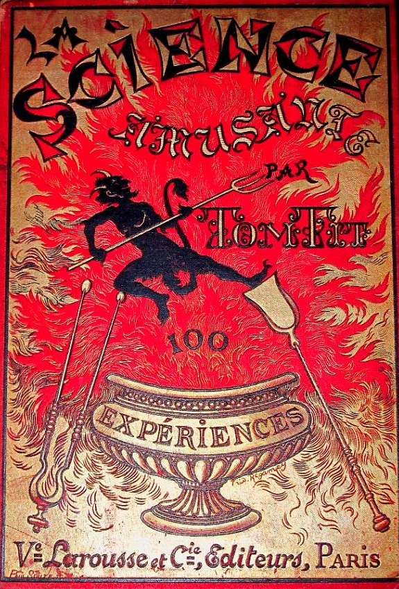 La Science amusante par Tom Tit [Arthur Good] 100 expériences, V[euv]e Larousse et Cie, Paris, [1890], second print, cover designed by Frédéric Régamey, book binding by Paul Souze, Paris.